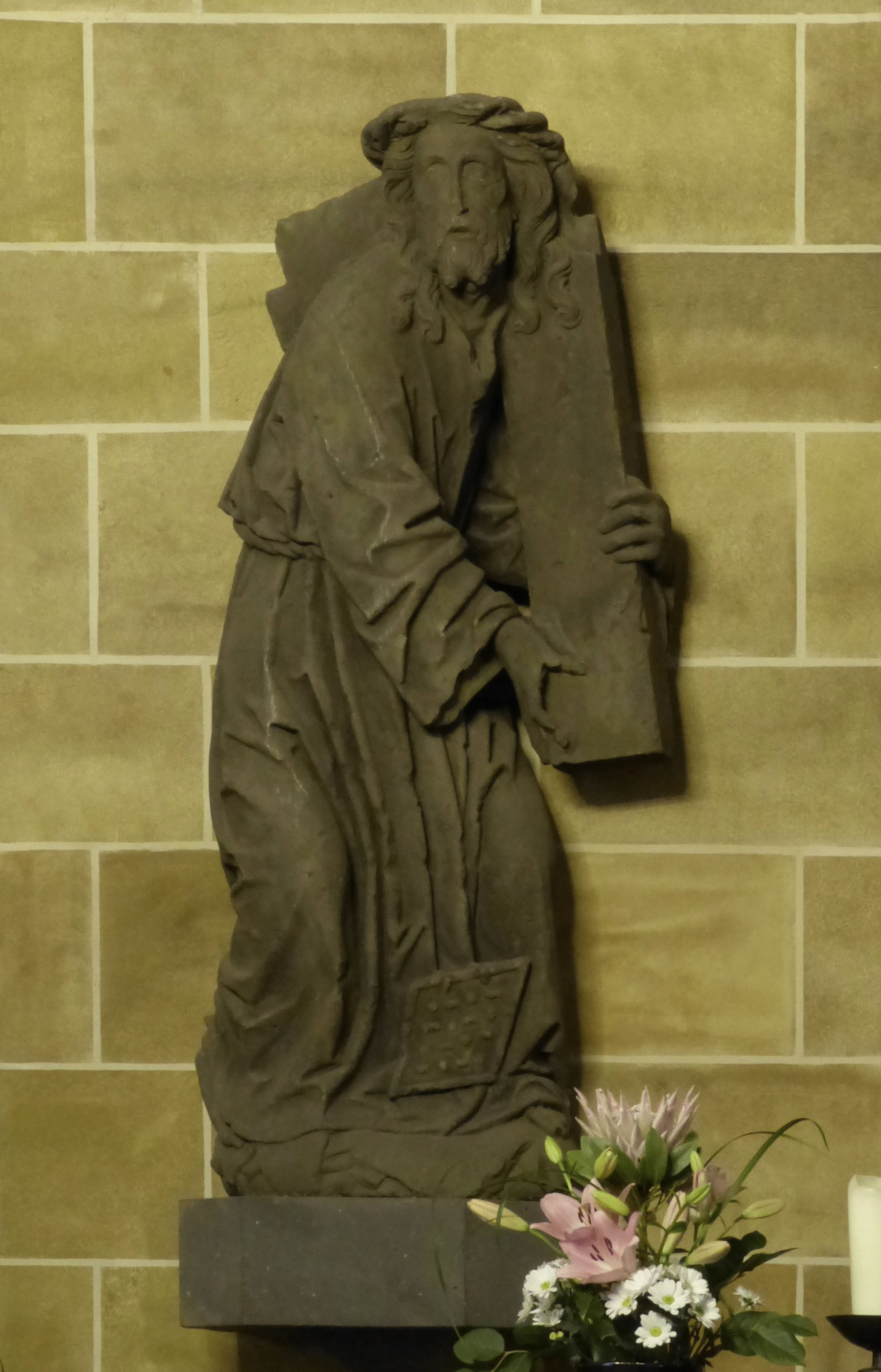 Kreuztragender Christus, Torso der Skulptur aus der Blendarkade neben dem linken Westportal, heute als Altarfigur im Mittelschiff neben der Kanzel